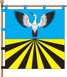 Прапор Байковецької сільської громади